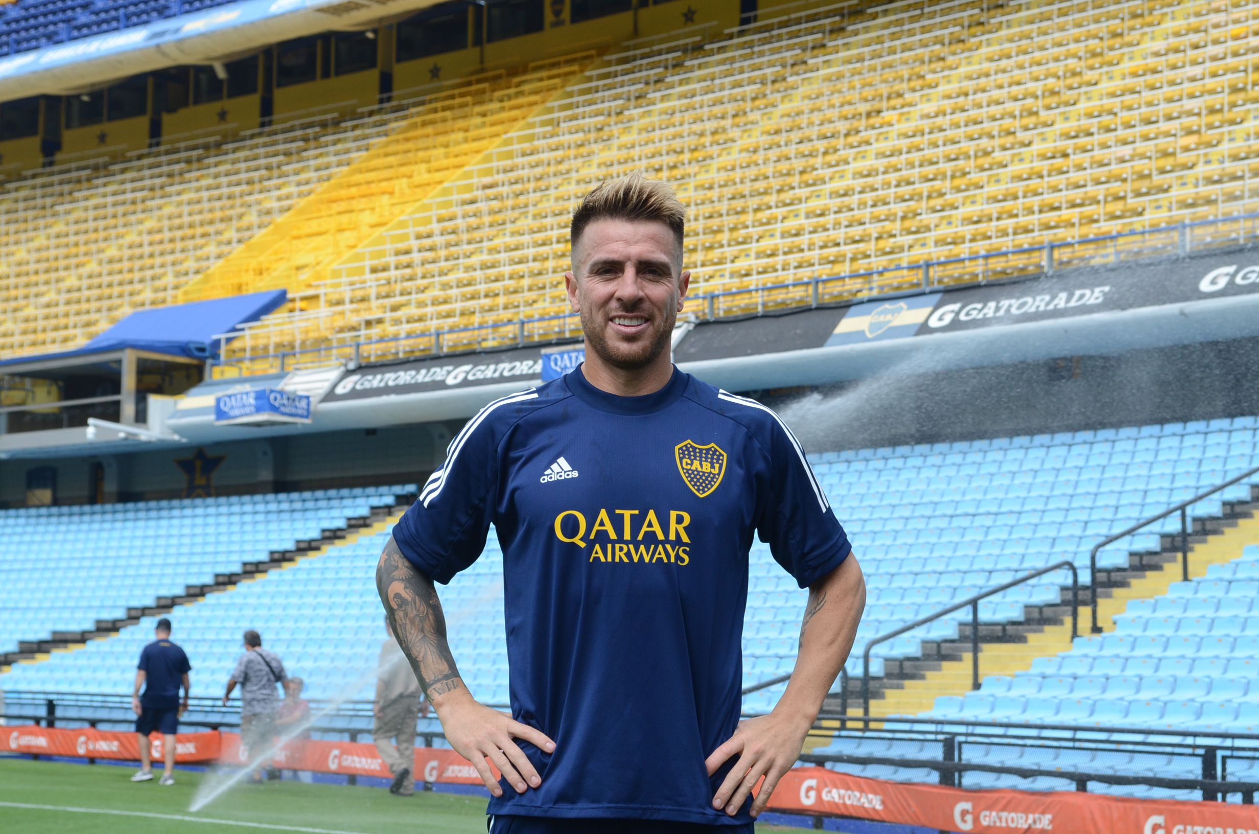 Julio Buffarini en la Bombonera